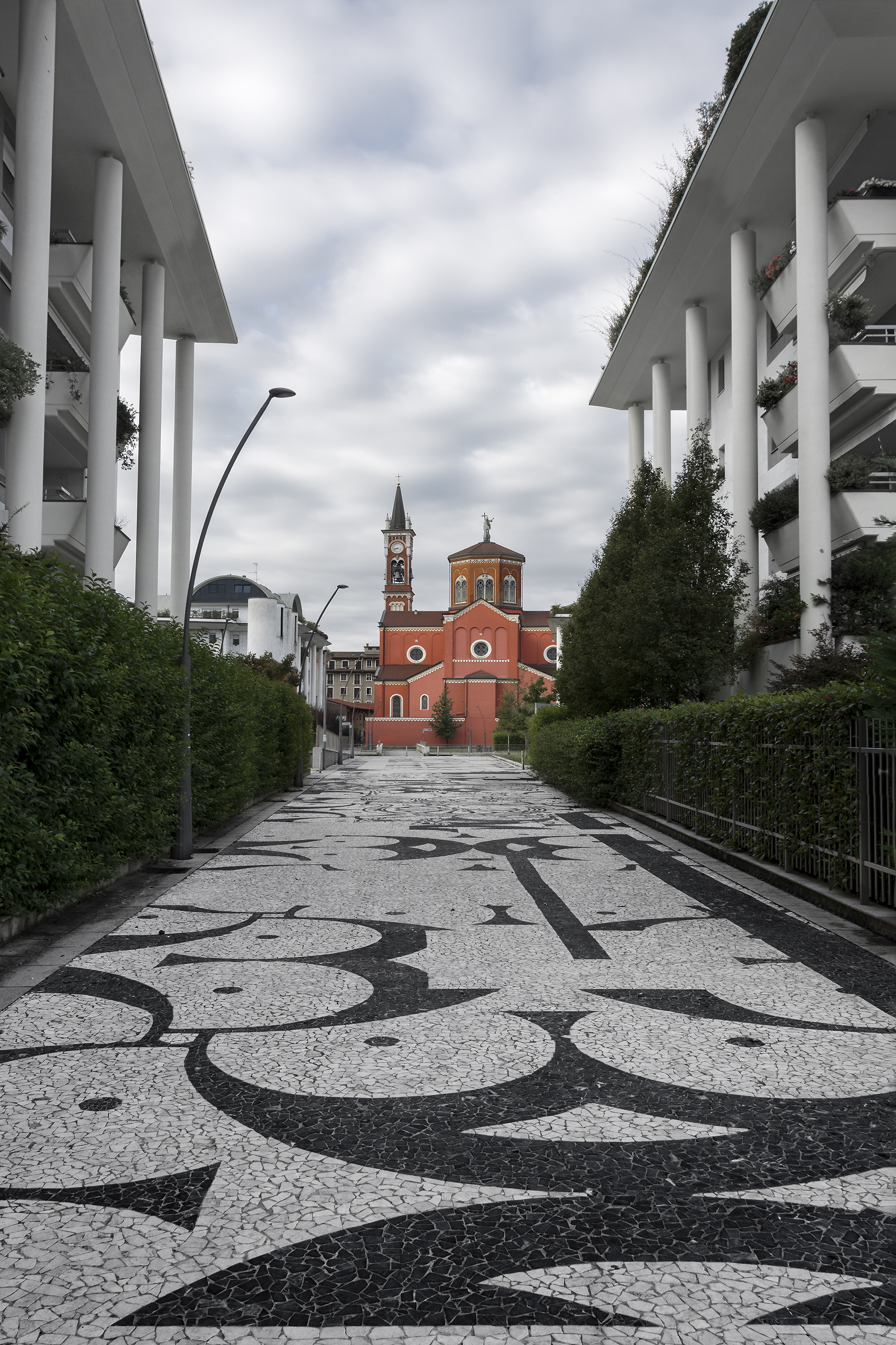 Q30061447 This is a photo of a monument which is part of cultural heritage of Italy.